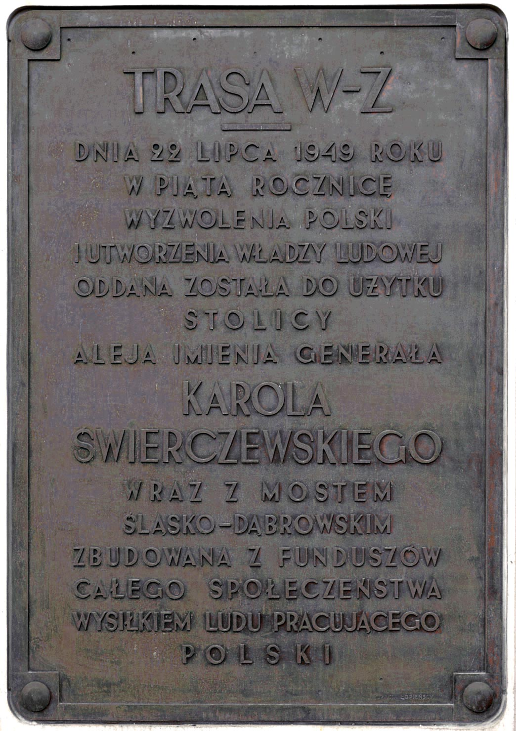 Tablica pamiątkowa z okazji otwarcia trasy W-Z w Warszawie